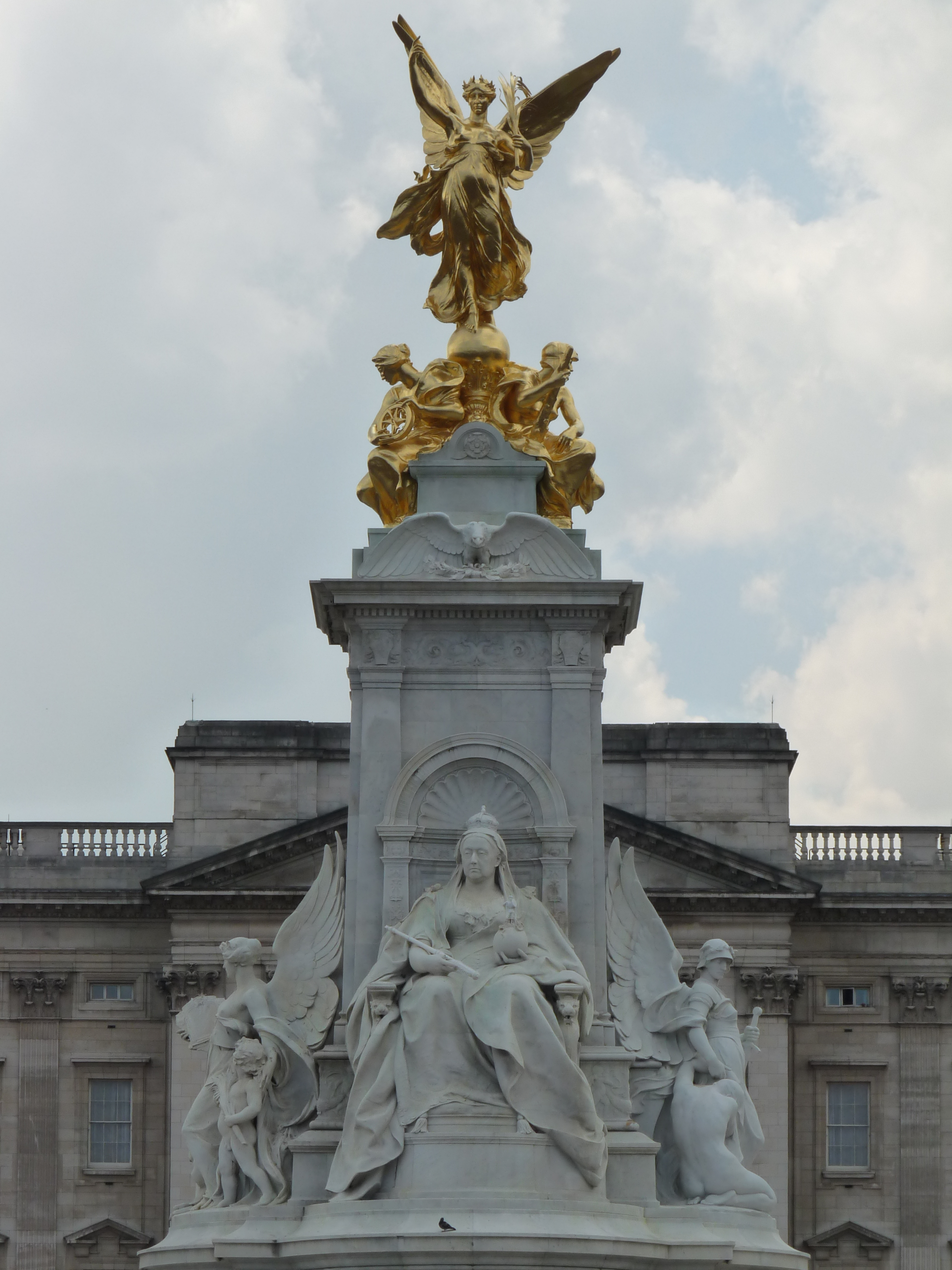 London